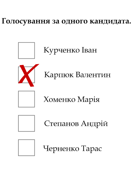 Виборча система